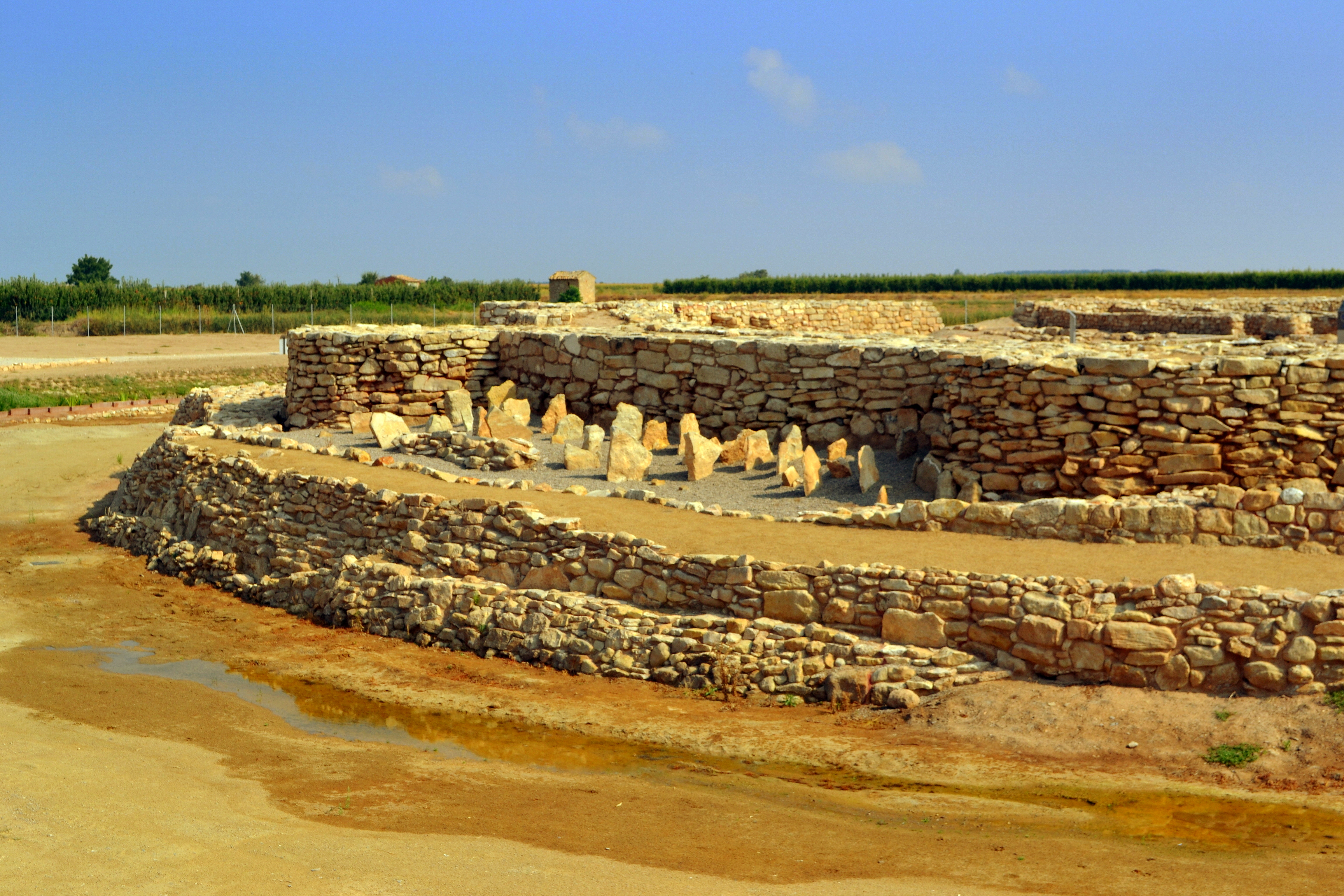 La fortalesa d'els Vilars d'Arbeca (750 aC - 325 aC)